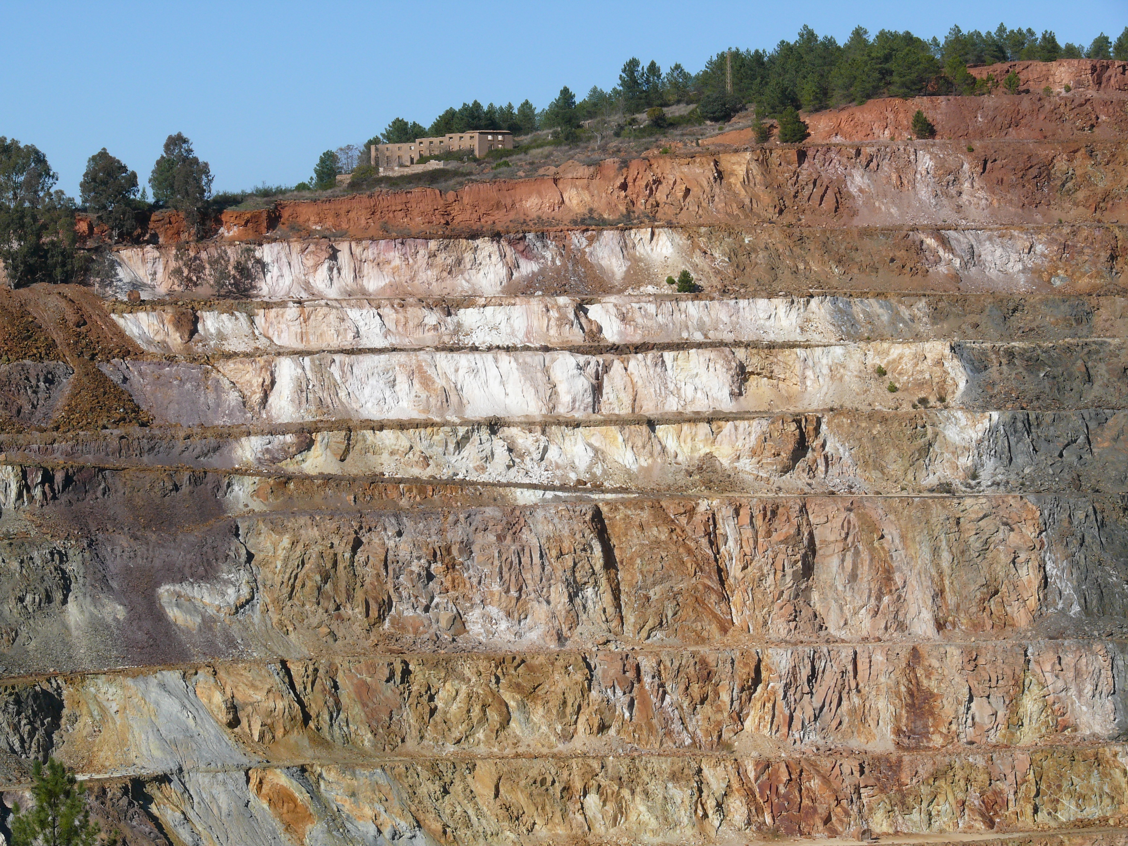 Restos del desaparecido pueblo Atalaya.